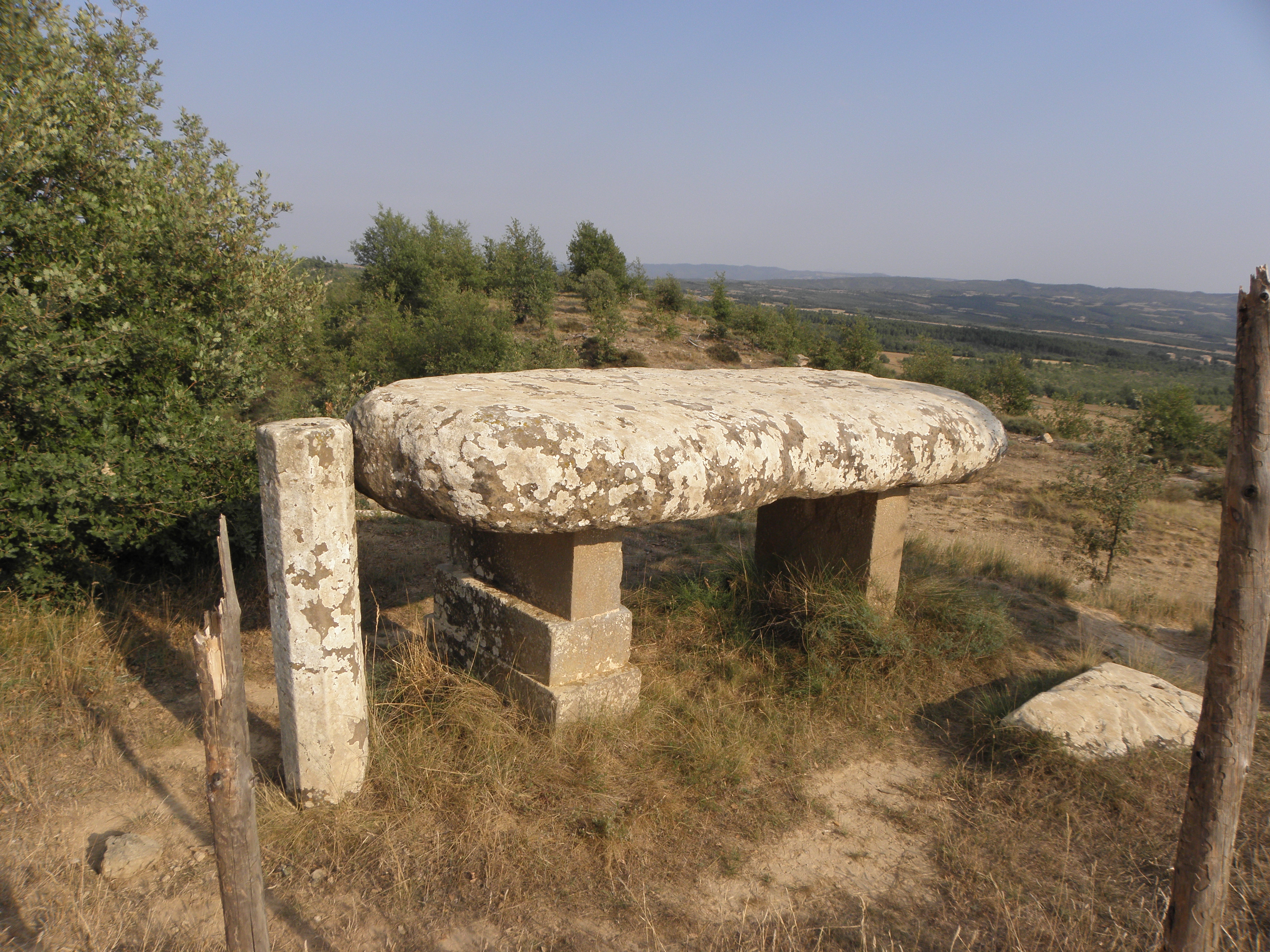 El roc de la Mare de Déu, a les rodalies del Santuari del Miracle (Riner, Solsonès) vist des del NO.